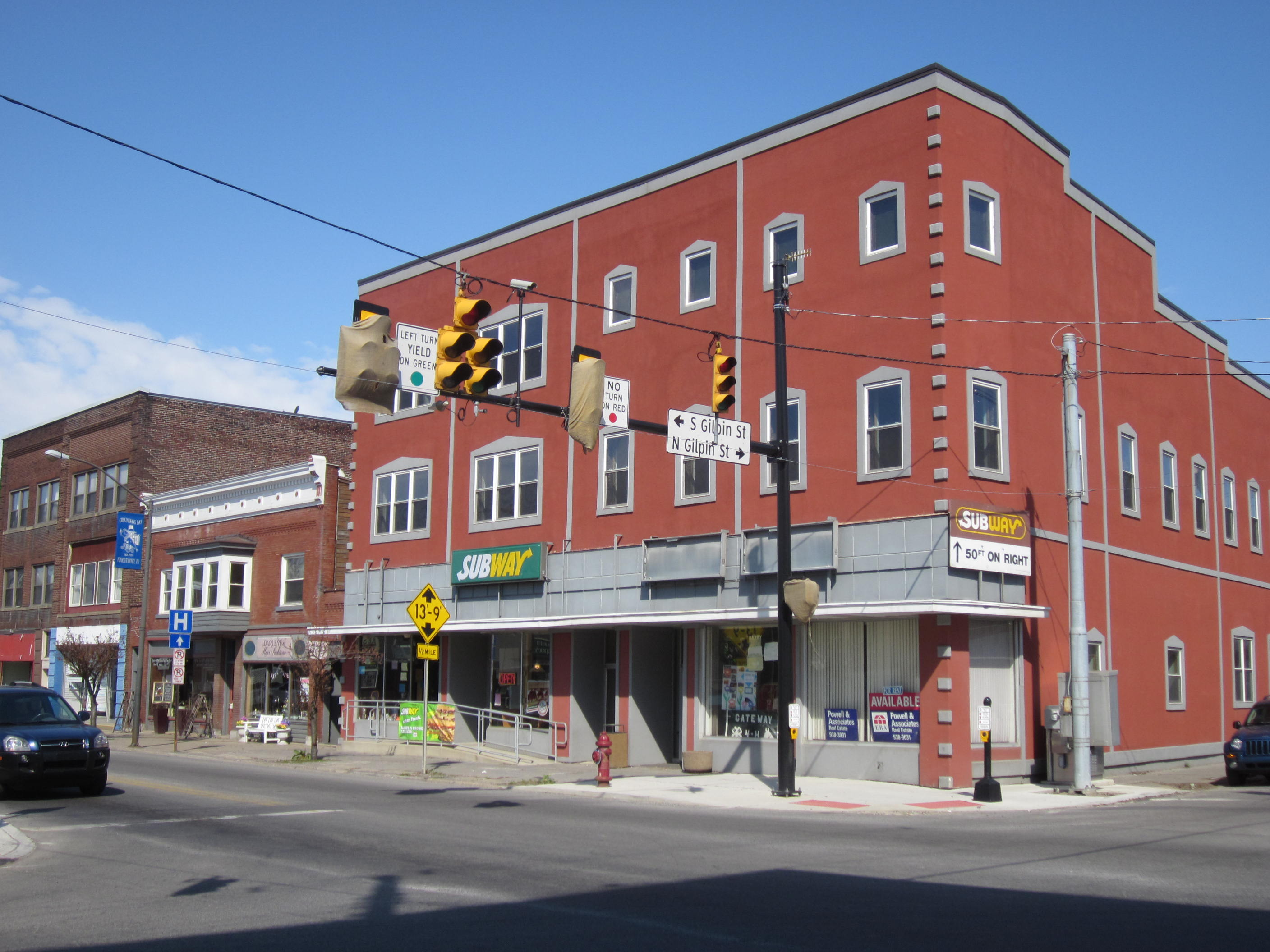 Punxsutawney, Pennsylvania